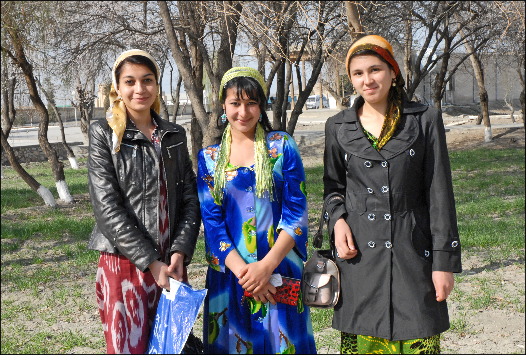 Jeunes femmes visitant le mausolée de Bakhaouddin Nakhchbandi (1318-1389), l'un des saints les plus vénérés de l'Islam soufique, dans les environs de Boukhara.